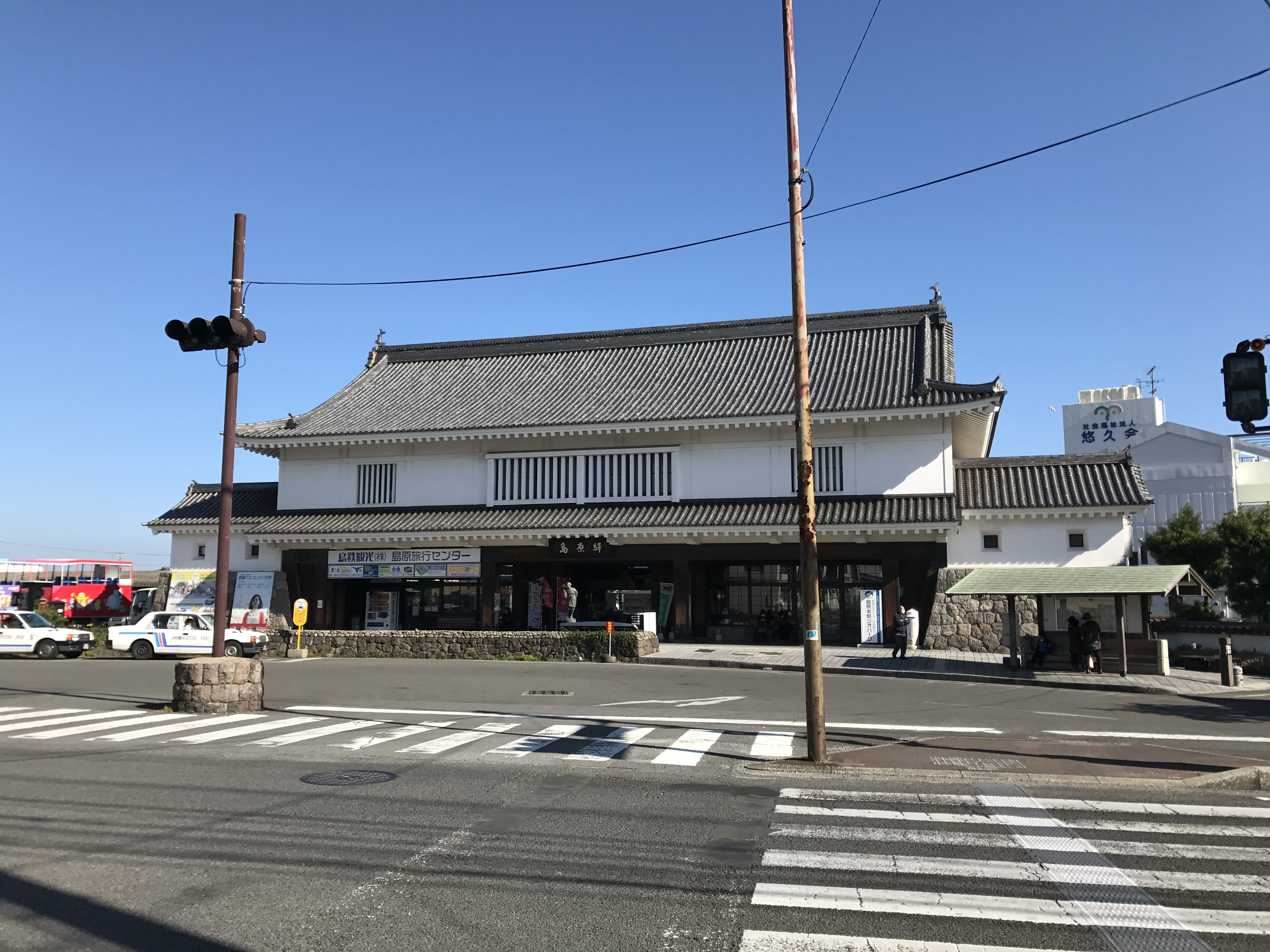 島原駅駅舎